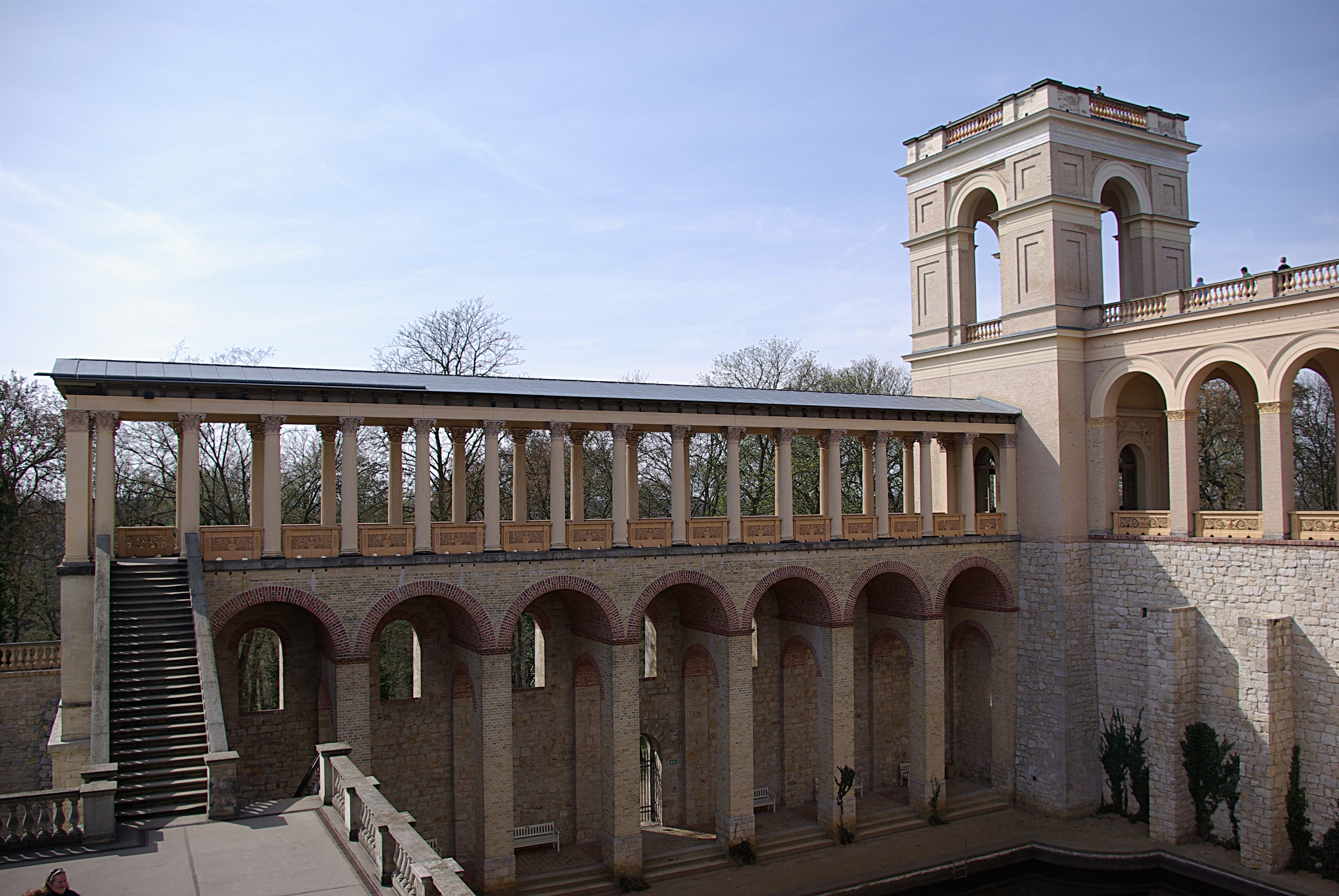 Potsdam in Brandenburg. Die Kolonaden der Belvedere in Potsdam. Das Gebäude gehört zum Weltkulturerbe.